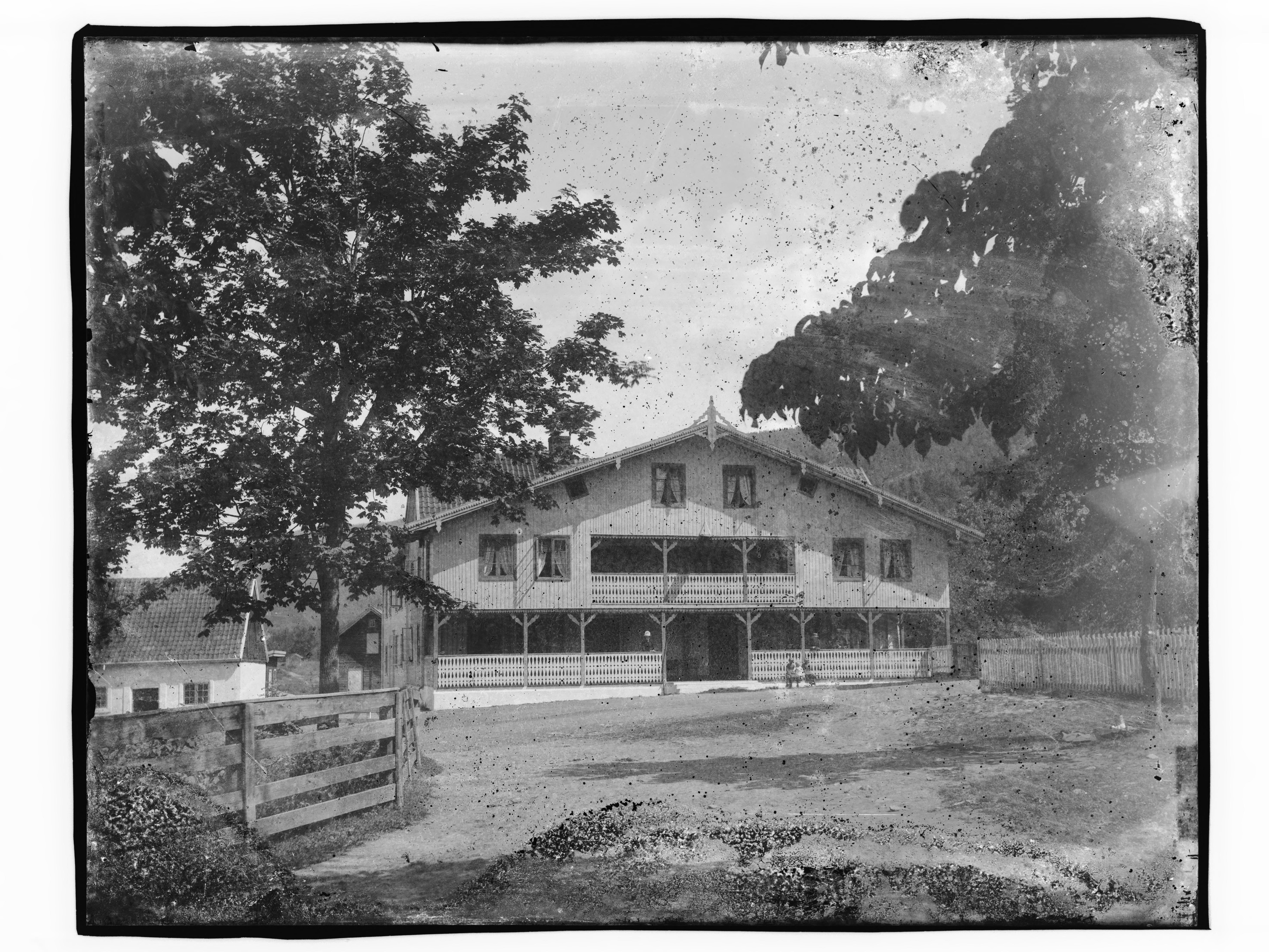 Påskrift konvolutt: Stort gammelt trehus [Riksantikvaren] Sted: Sundvollen Kommune: Hole Fylke: Buskerud Tagger: Sundvolden hotel hotell trehus fasade tuntre